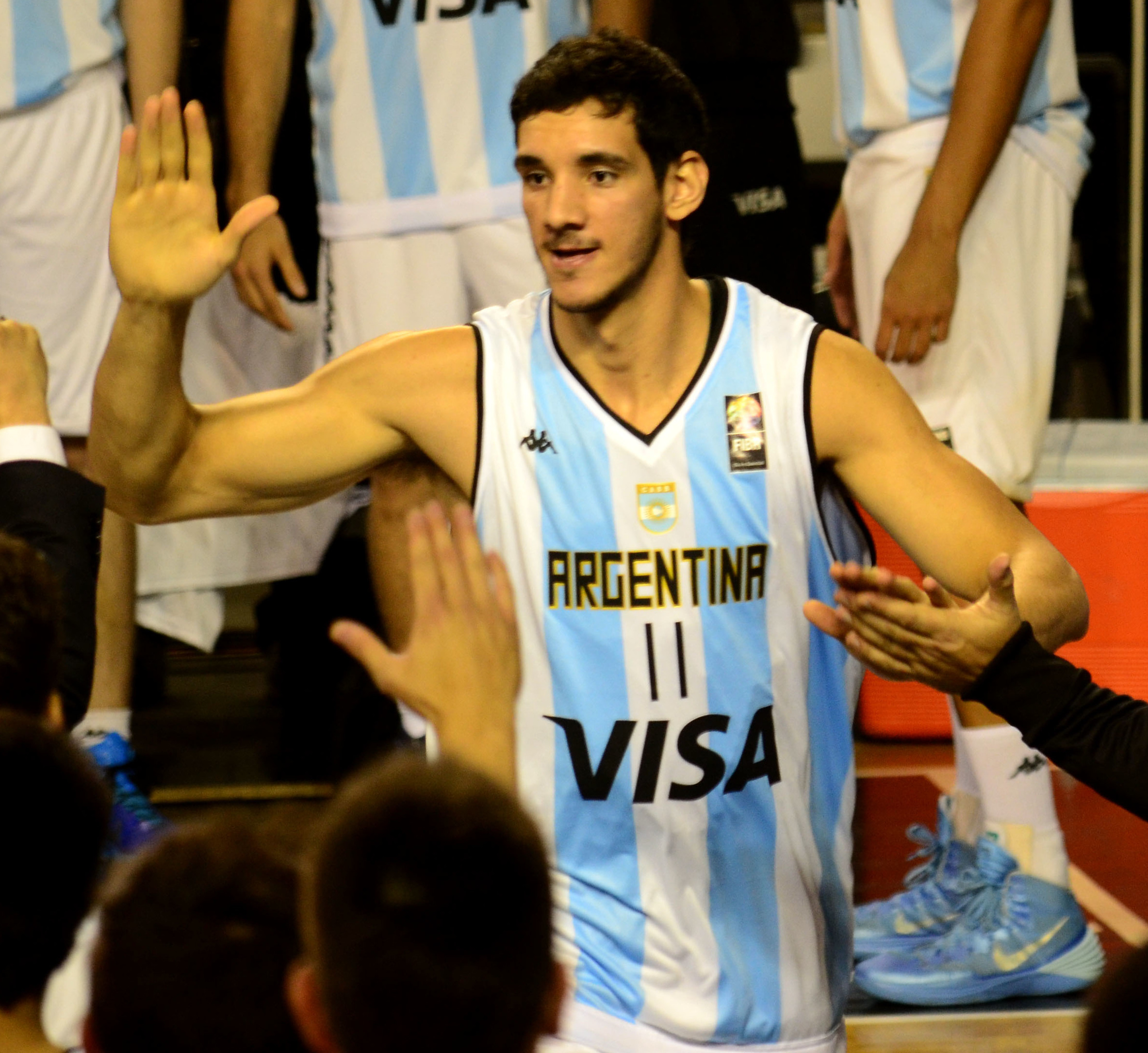 Tayavek Gallizi